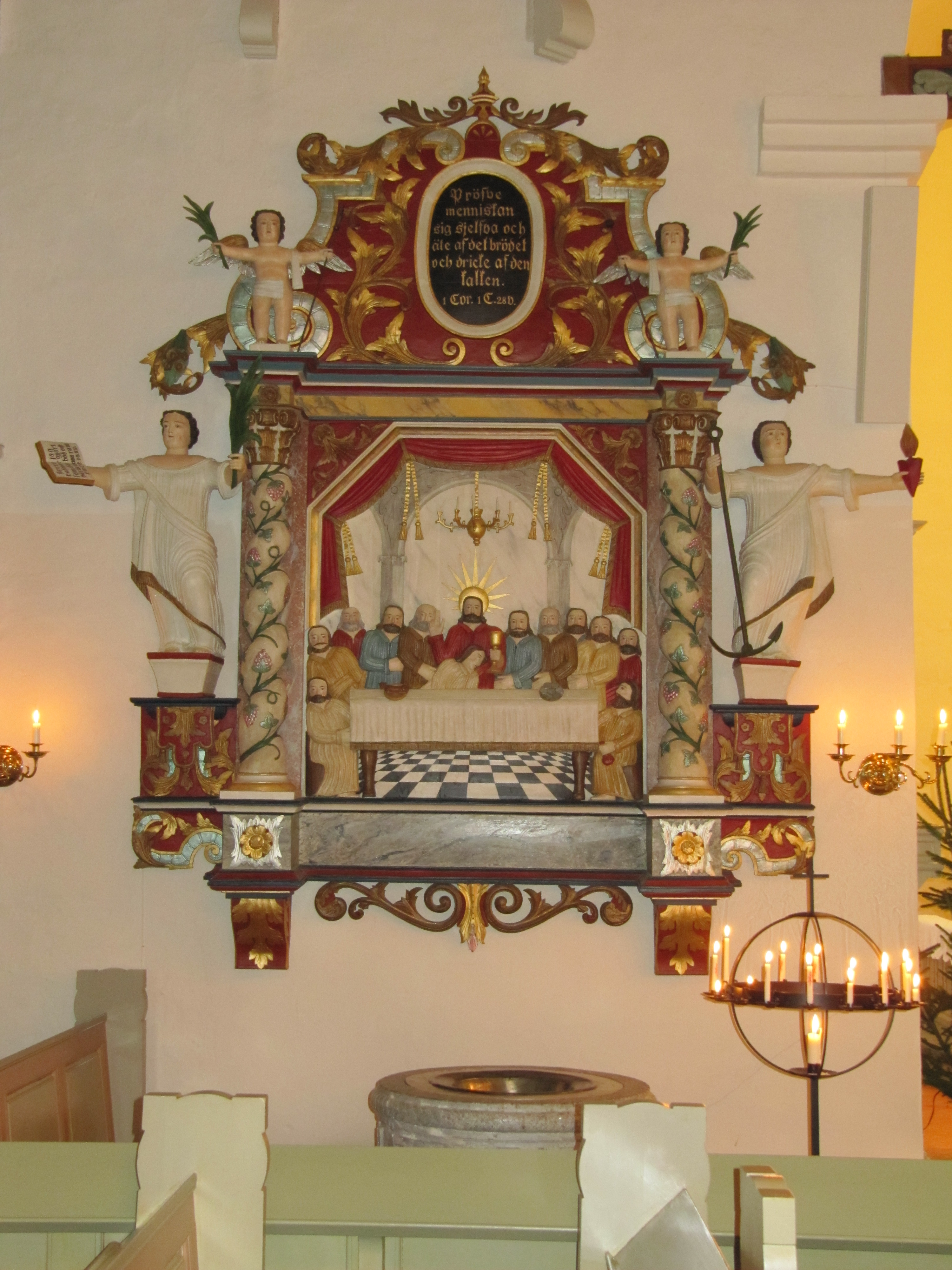 Gamla altaruppsatsen